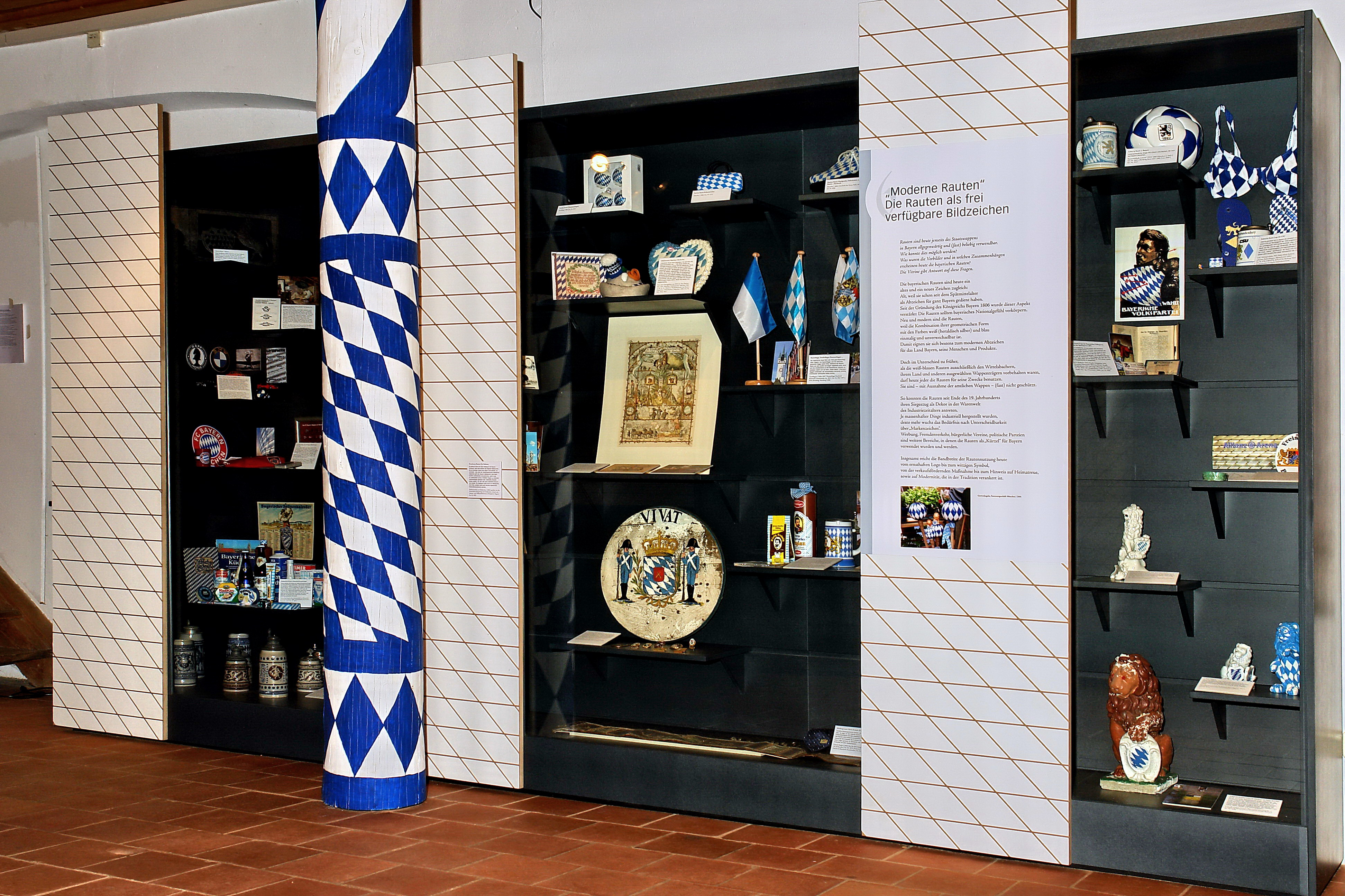 Kreismuseum Bogenberg. Die Rauten als moderenes Bildzeichen.